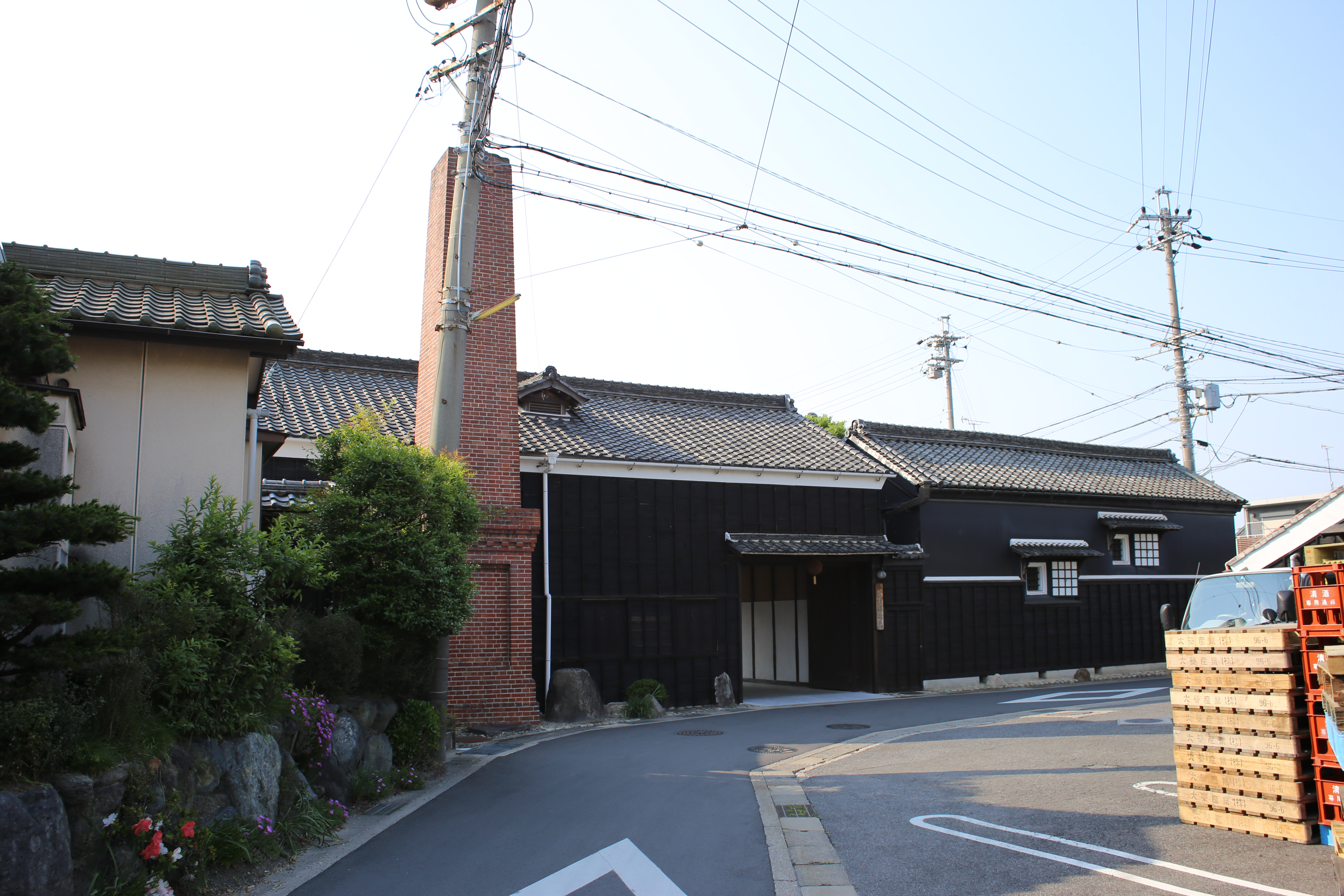 名古屋市緑区大高町西門田の萬乗醸造を南側公道より撮影